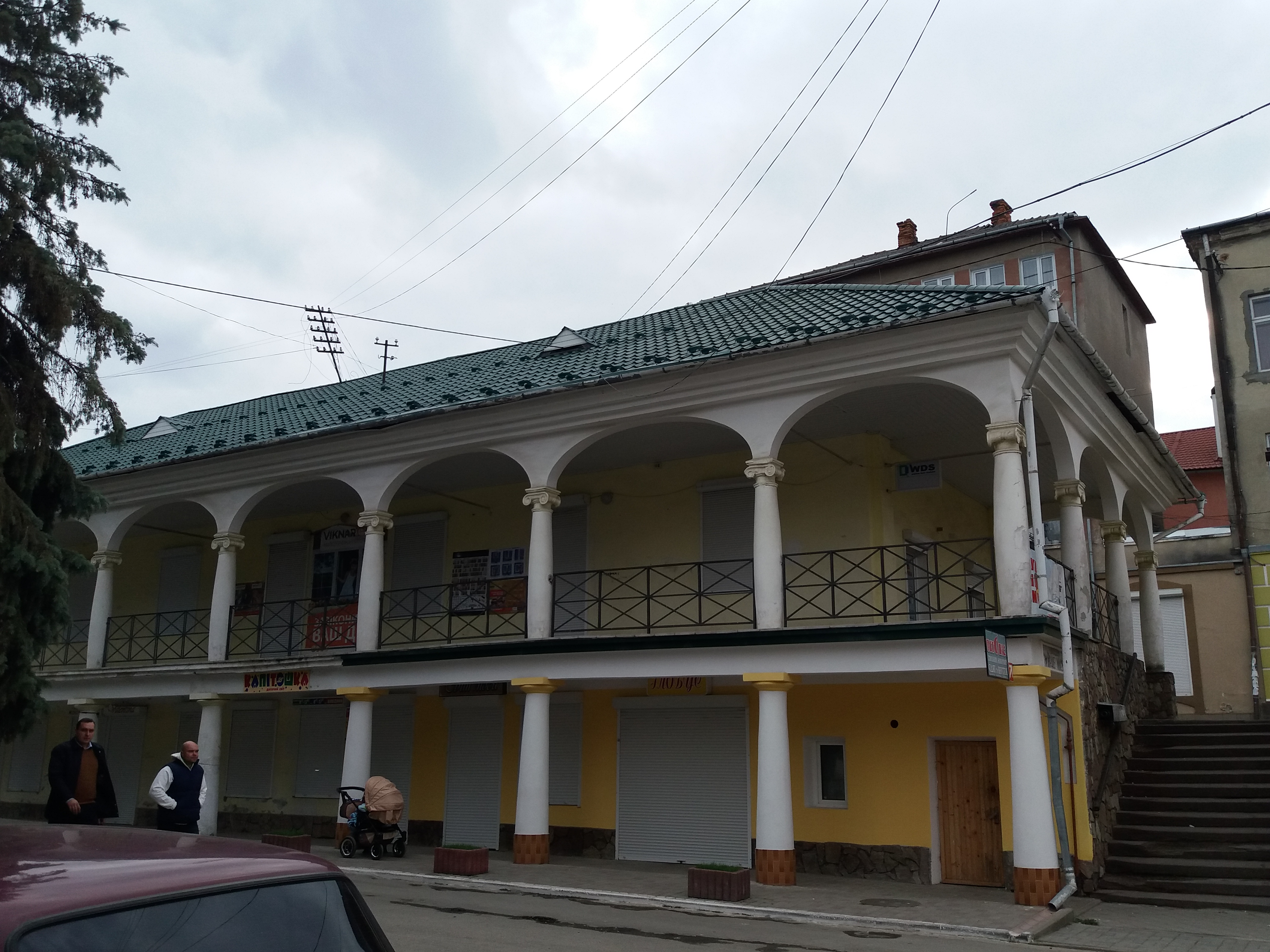 Стара ратуша (мур.), Чортків, пл. Ринок, 18